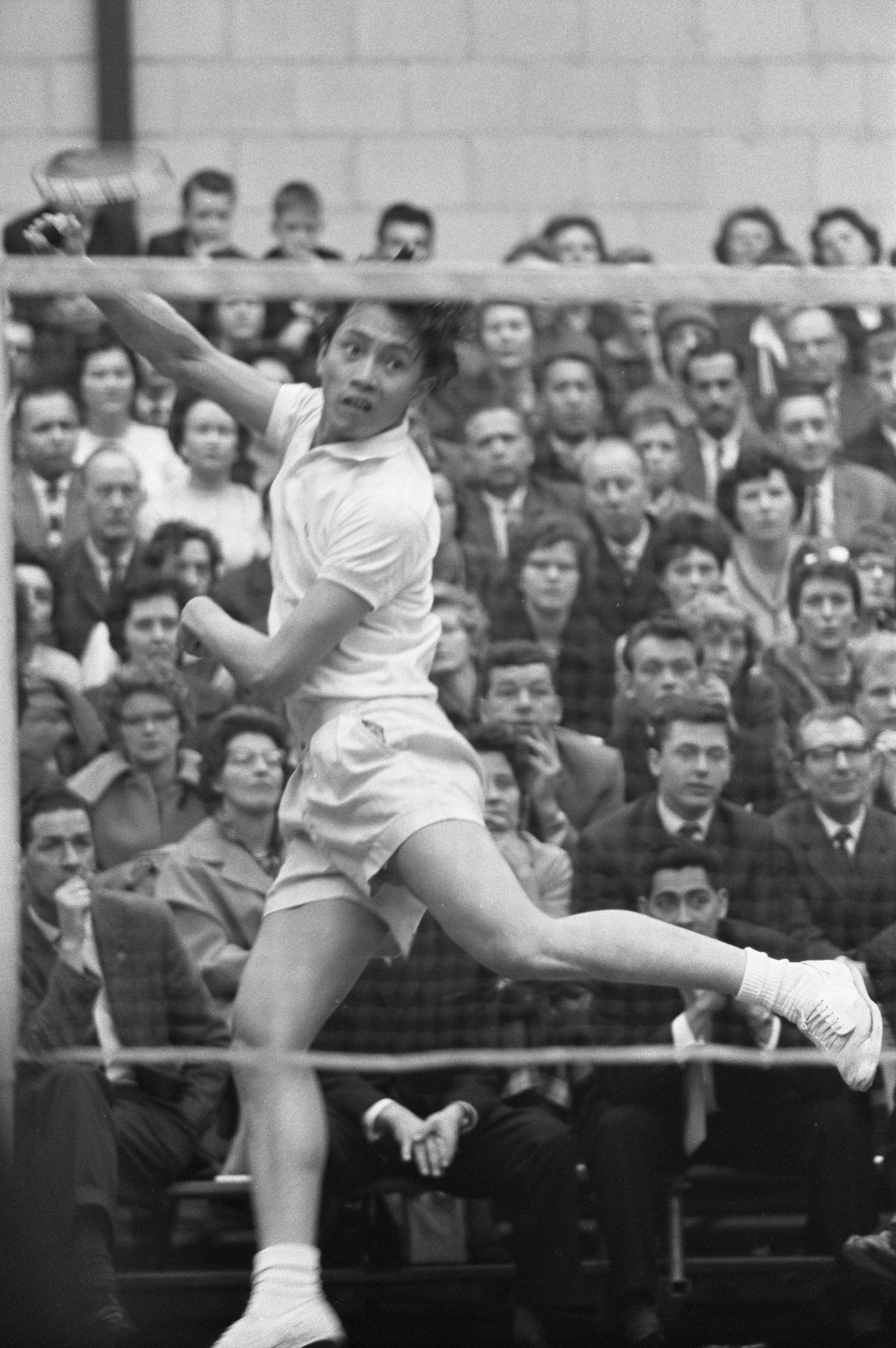 Collectie / Archief : Fotocollectie Anefo Reportage / Serie : [ onbekend ] Beschrijving : Internationale Badmintonkampioenschappen Haarlem in nieuw "Duinwijck" hal. Wattanasin Datum : 11 februari 1962 Locatie : Haarlem Trefwoorden : Badminton, kampioenschappen Fotograaf : Pot, Harry / Anefo Auteursrechthebbende : Nationaal Archief Materiaalsoort : Negatief (zwart/wit) Nummer archiefinventaris : bekijk toegang 2.24.01.05 Bestanddeelnummer : 913-5115